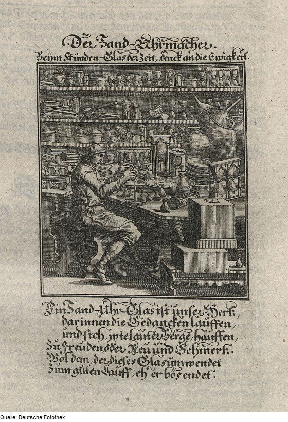 Original image description from the Deutsche Fotothek Ständebuch & Beruf & Handwerk & Sanduhr & Uhr & Uhrmacher